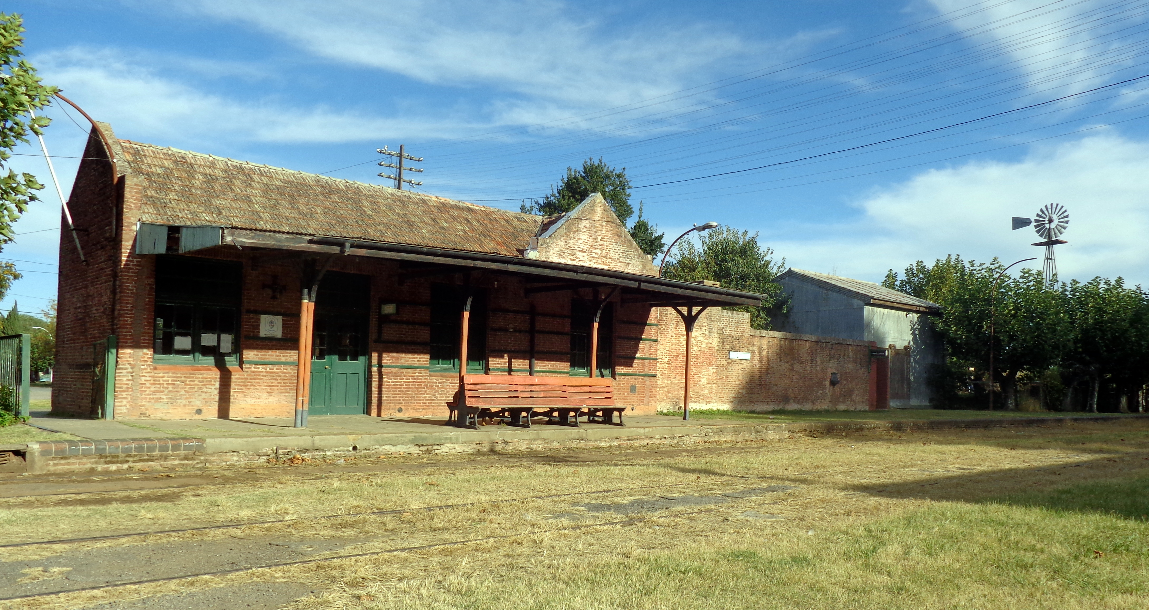 Estación Uribelarrea, en Uribalarrea, Cañuelas, Provincia de Buenos Aires, Argentina.